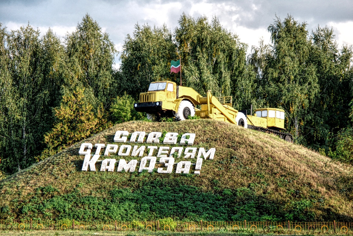 Памятник механизаторам стройки: Автомагистраль № 7, Тукаевский район, Татарстан